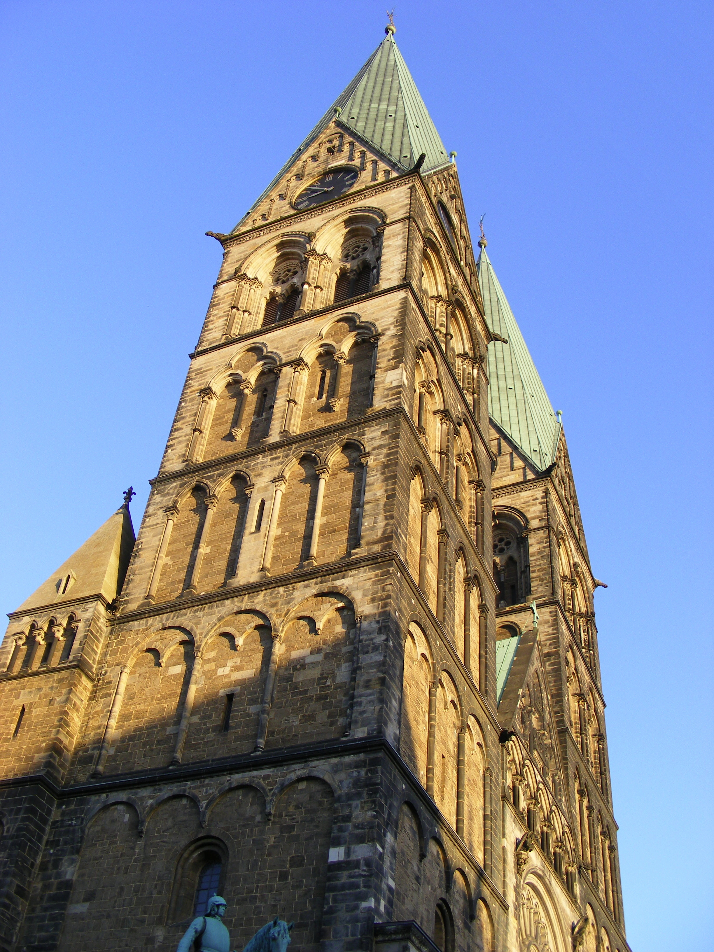 Nordturm des Bremer St. Petri-Doms 20:55, gesehen aus dem Haupteingang des (Neuen) Rathauses